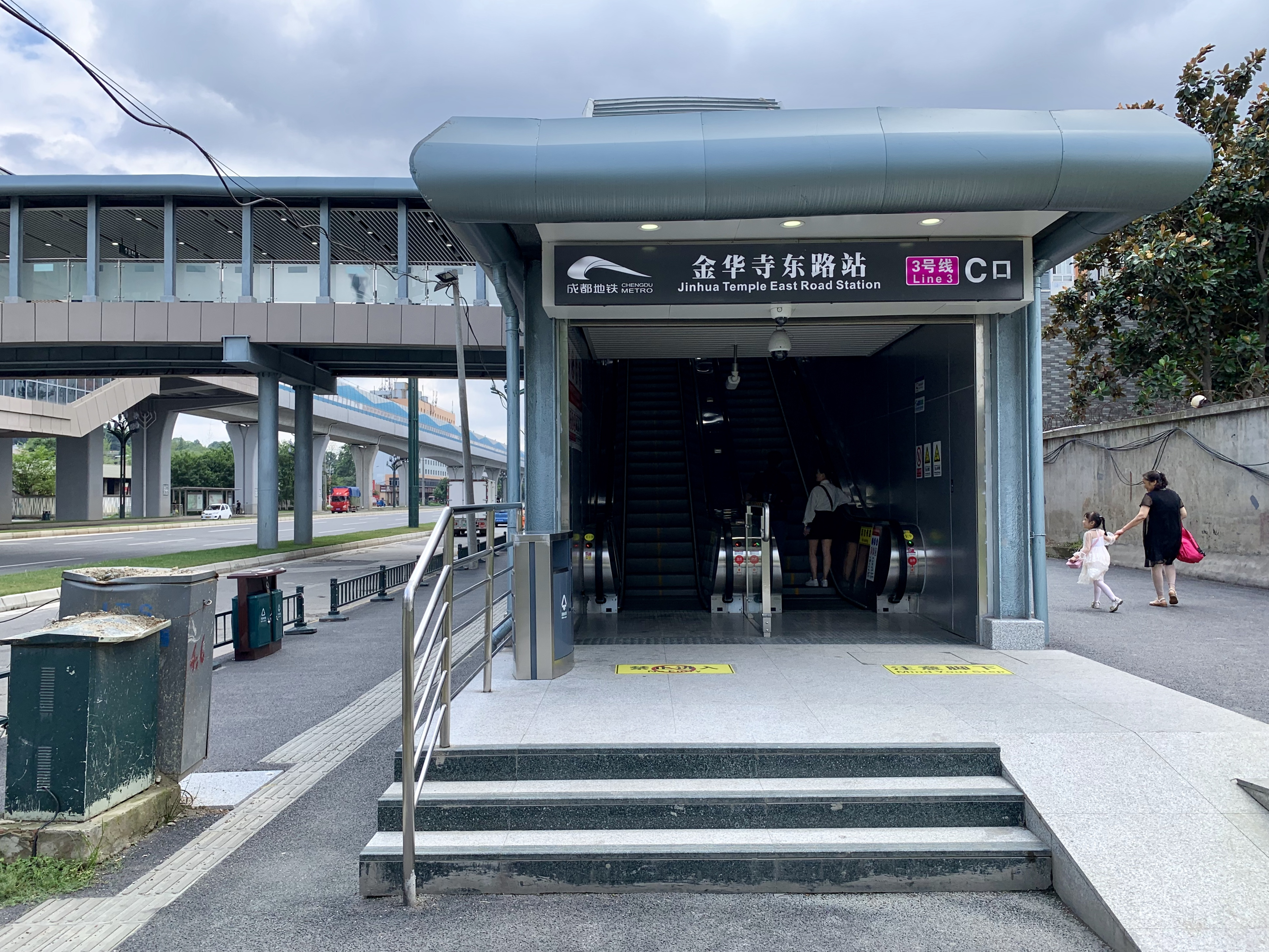 成都地铁金华寺东路站